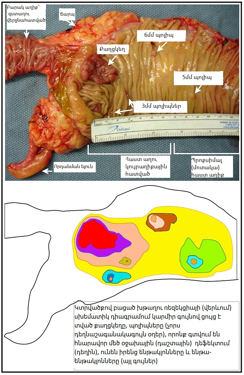 Երկայնաձիգ կերպով բացված հաստ աղիքի թարմ ռեզեկցված սեգմենտ, որում քաղցկեղ և չորս պոլիպներ են երևում։ Եվ սխեմատիկ դիագրամ, որում պատկերված է հնարավոր օջախային (դաշտային) դեֆեկտը (հյուսվածքի տեղամաս որը կանխորոշում և հակում է քաղցկեղի առաջացմանը) հաստ աղու այդ սեգմենտում։ Դիագրամում պատկերված են նաև ենթակլոններ և ենթա-ենթակլոններ, որոնք քաղցկեղի նախորդներն են։